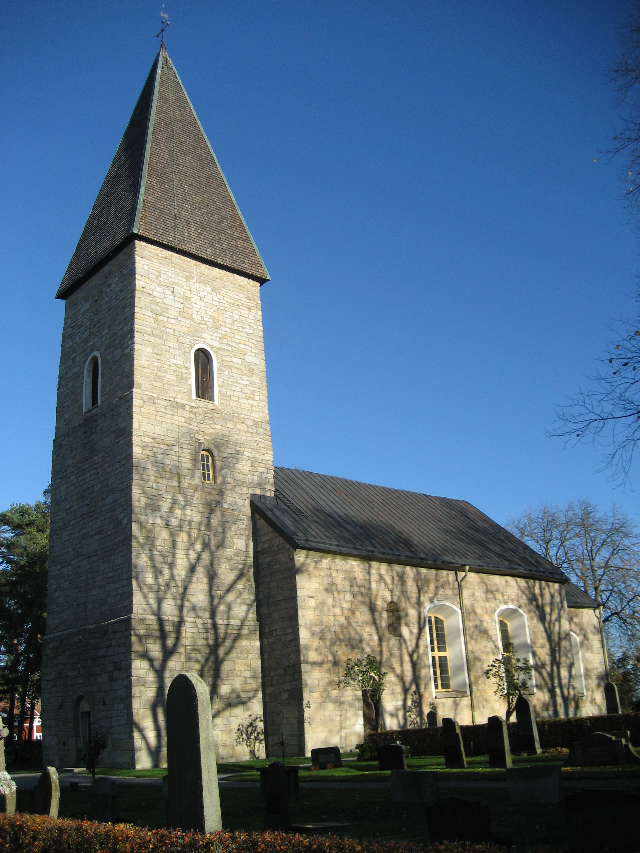 A photo of Mosjö kyrka, Örebro Sweden